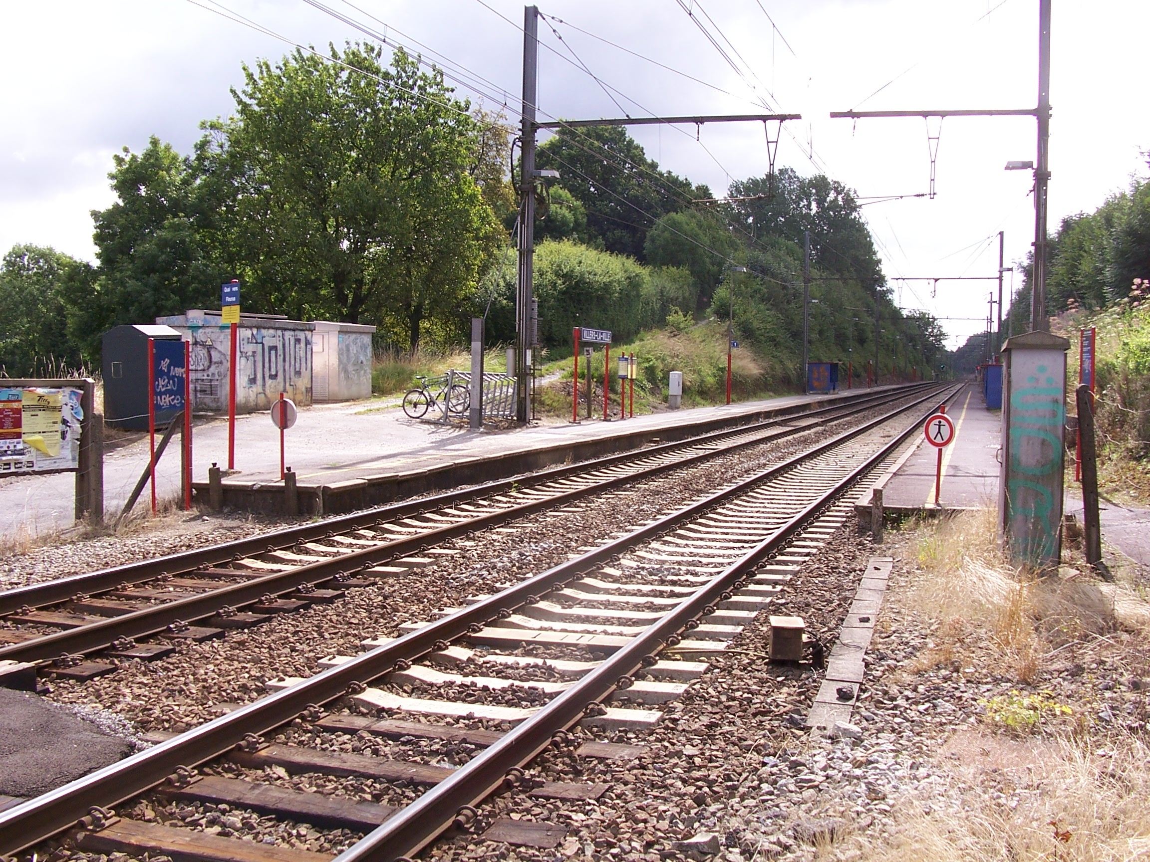 De spoorweghalte van Villers-la-Ville.